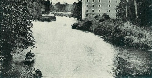 Les rives du Clain à Cenon-sur-Vienne. Première moitié du XIXe siècle.